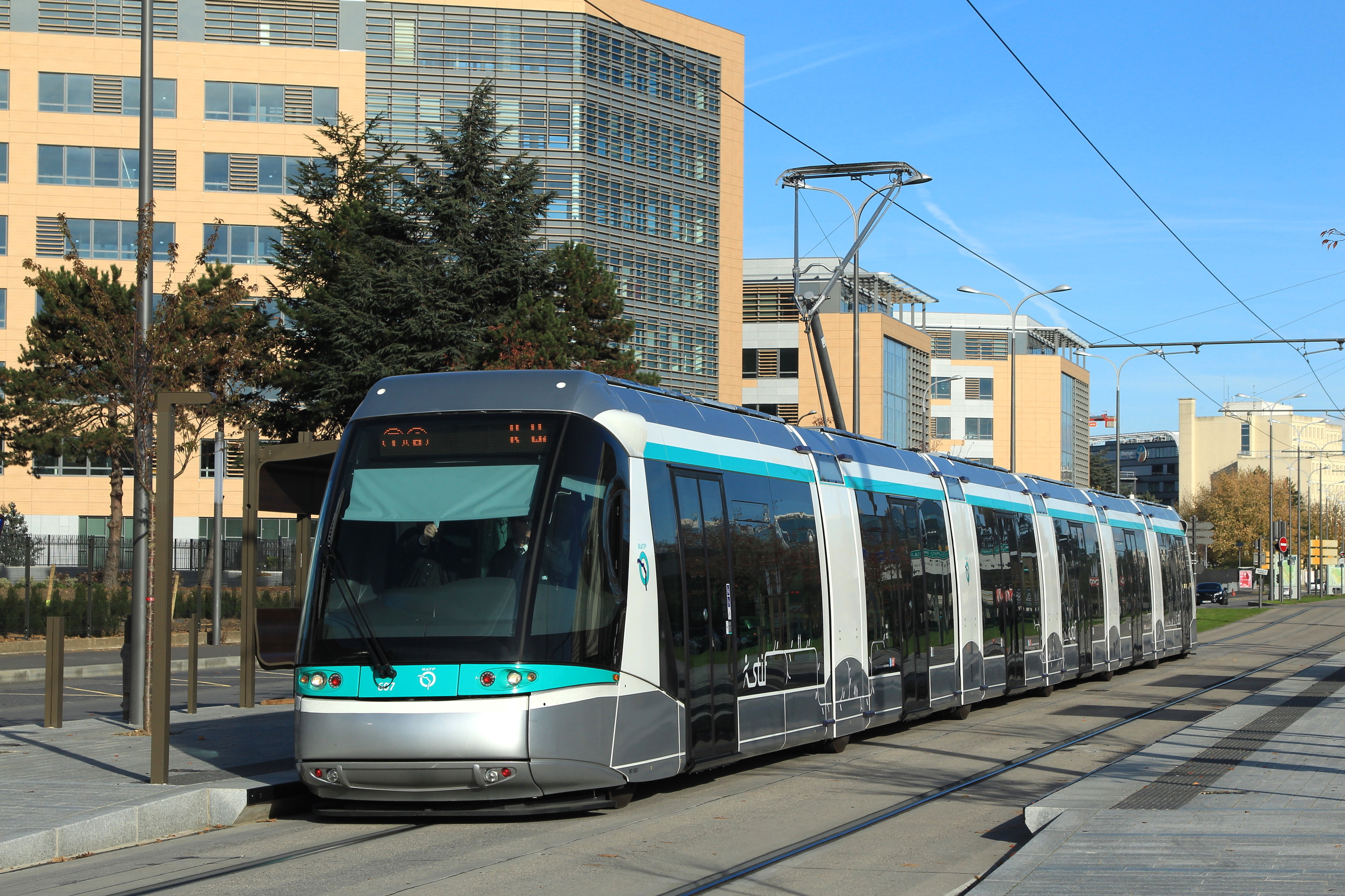 Un tramway en essais de la ligne 6 à la station « Dewoitine ».